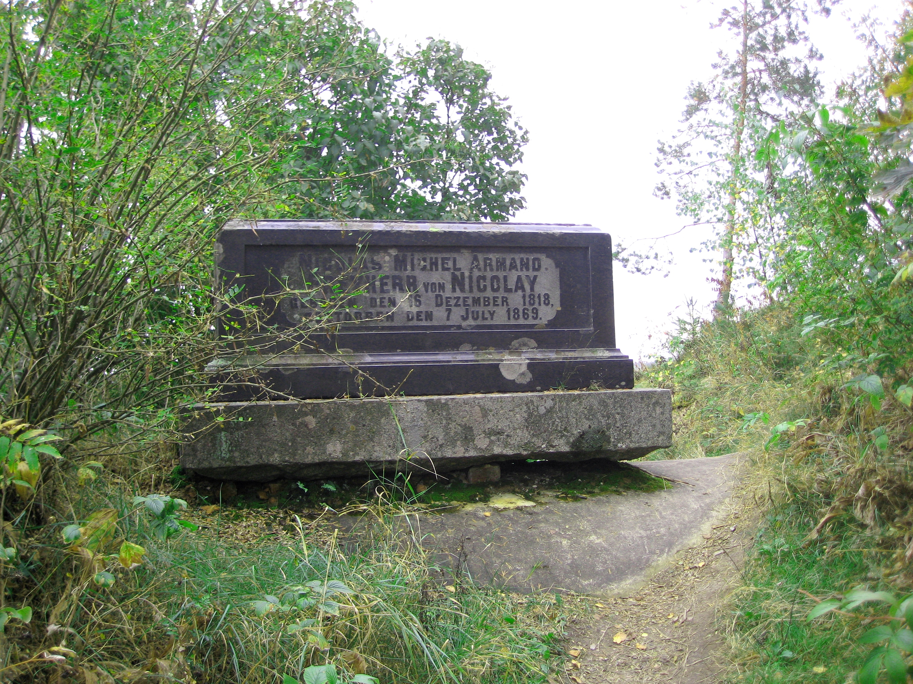 Остров Людвигштейн. Плита над склепом Николауса Арманд Мишель фон Николаи: парк Монрепо, Выборг, Выборгский район, Ленинградская область